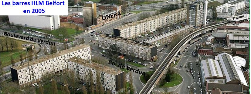 photo aérienne de la porte de Valenciennes en 2005